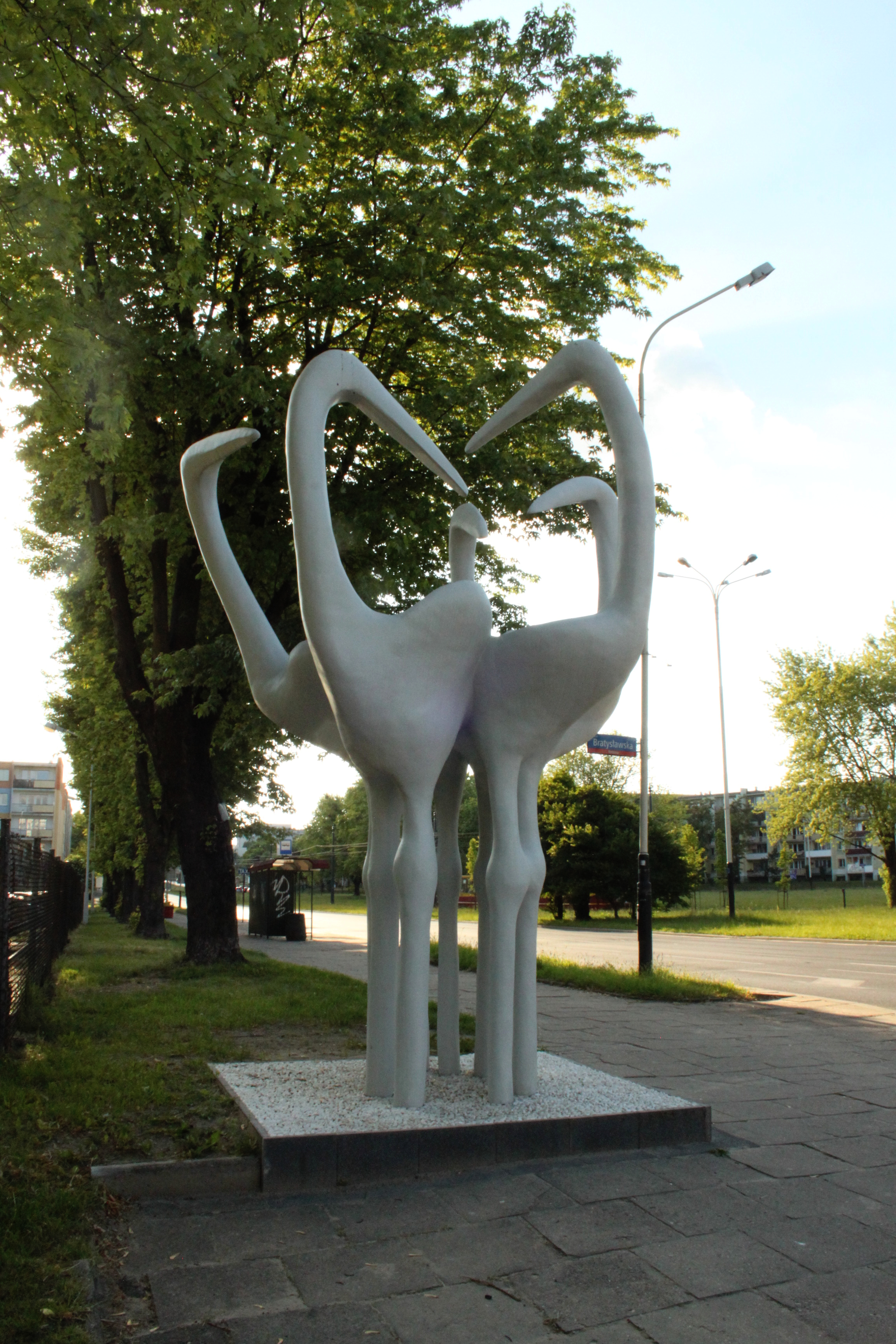 Rzeźba bocianów na Retkini (maj 2018)